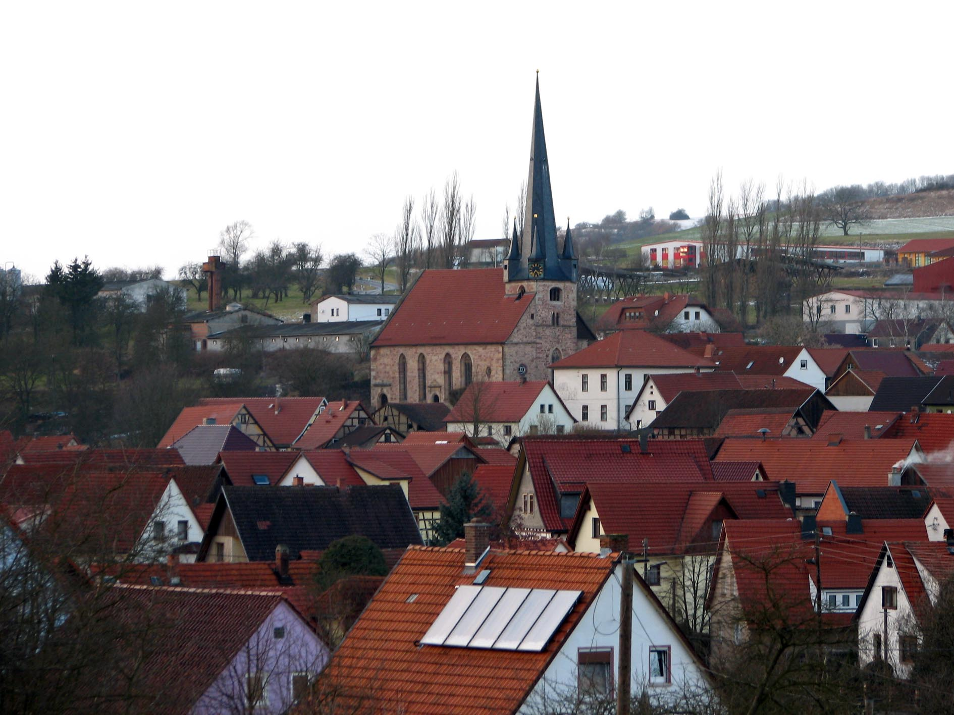 Bettenhausen